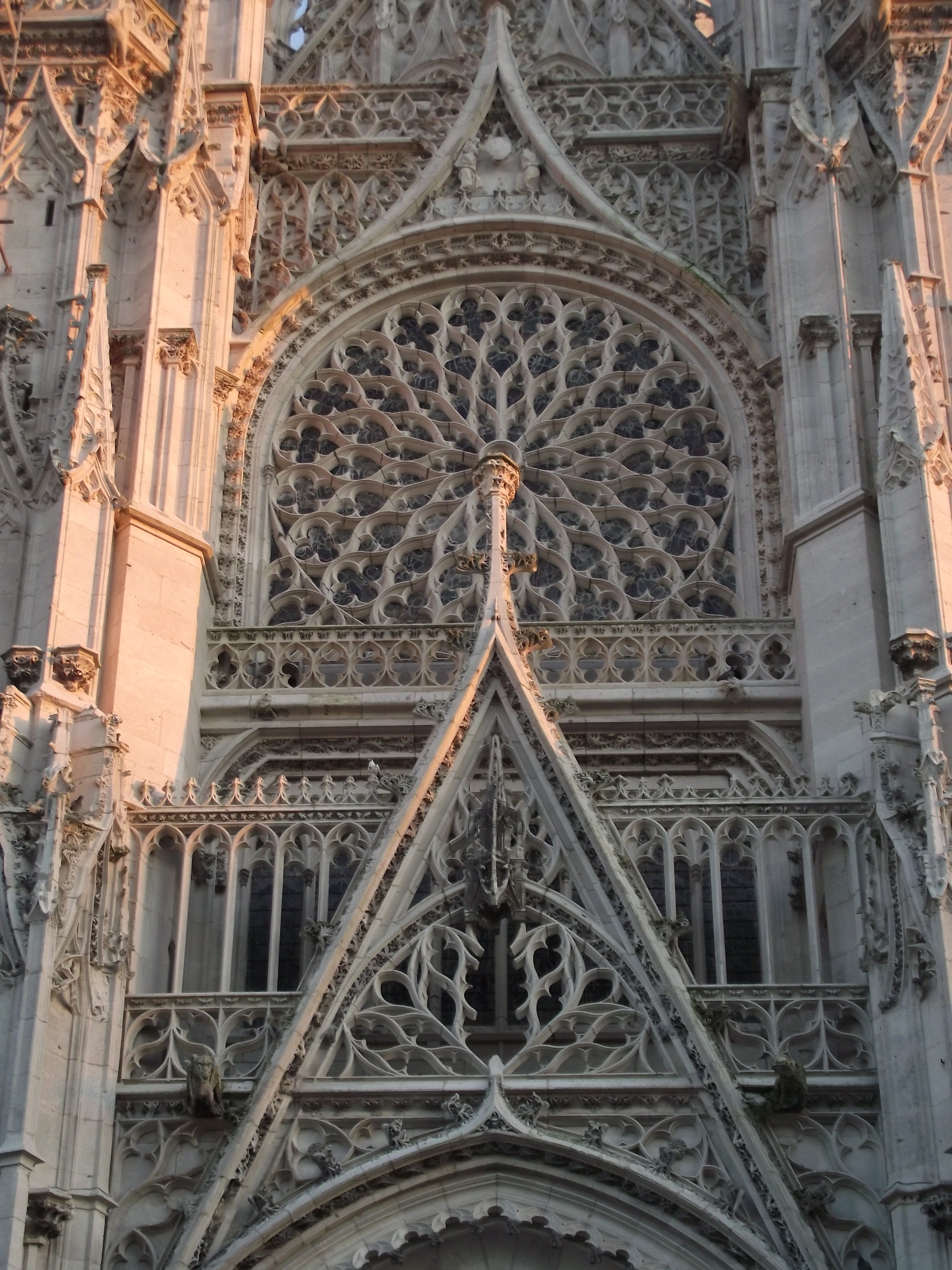 Cathédrale Notre-Dame, XIII-XV siècle